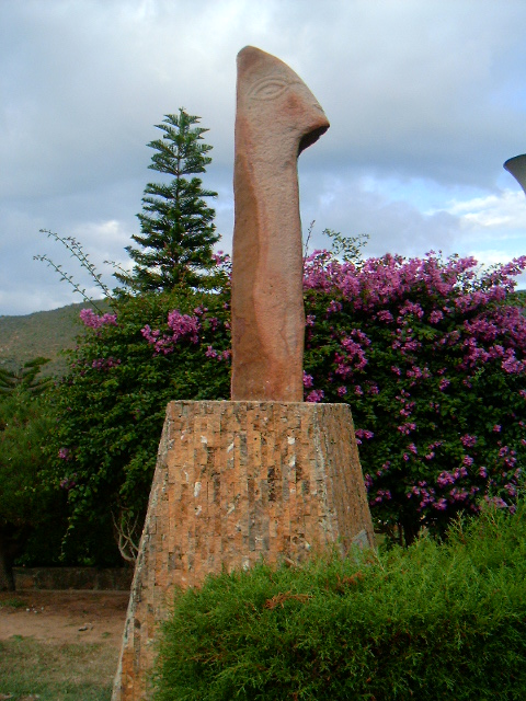 "Díos Mohán", Estatua precolombina ubicada en Betulia, Santander, Colombia. Imagen propia (del autor) tomada en julio de 2004, que no viola ninguna política de copyright Licencia